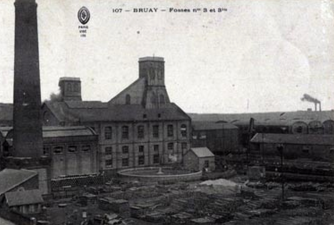 Fosse n° 3 de la Compagnie des mines de Bruay, ouverte en 1866 et fin de l' exploitation en Décembre 1966.